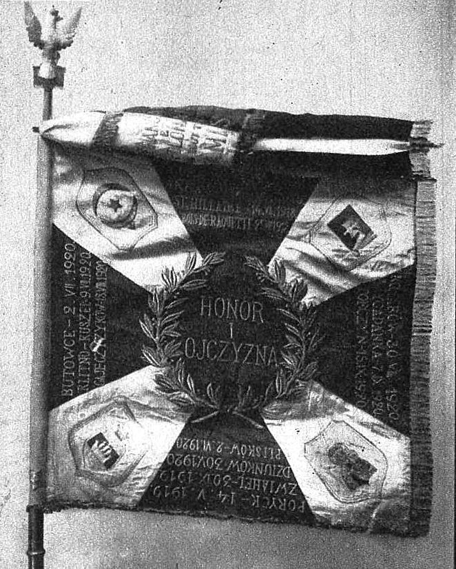 Sztandar 43 Pułku Strzelców Legionu Bajończyków z 1929